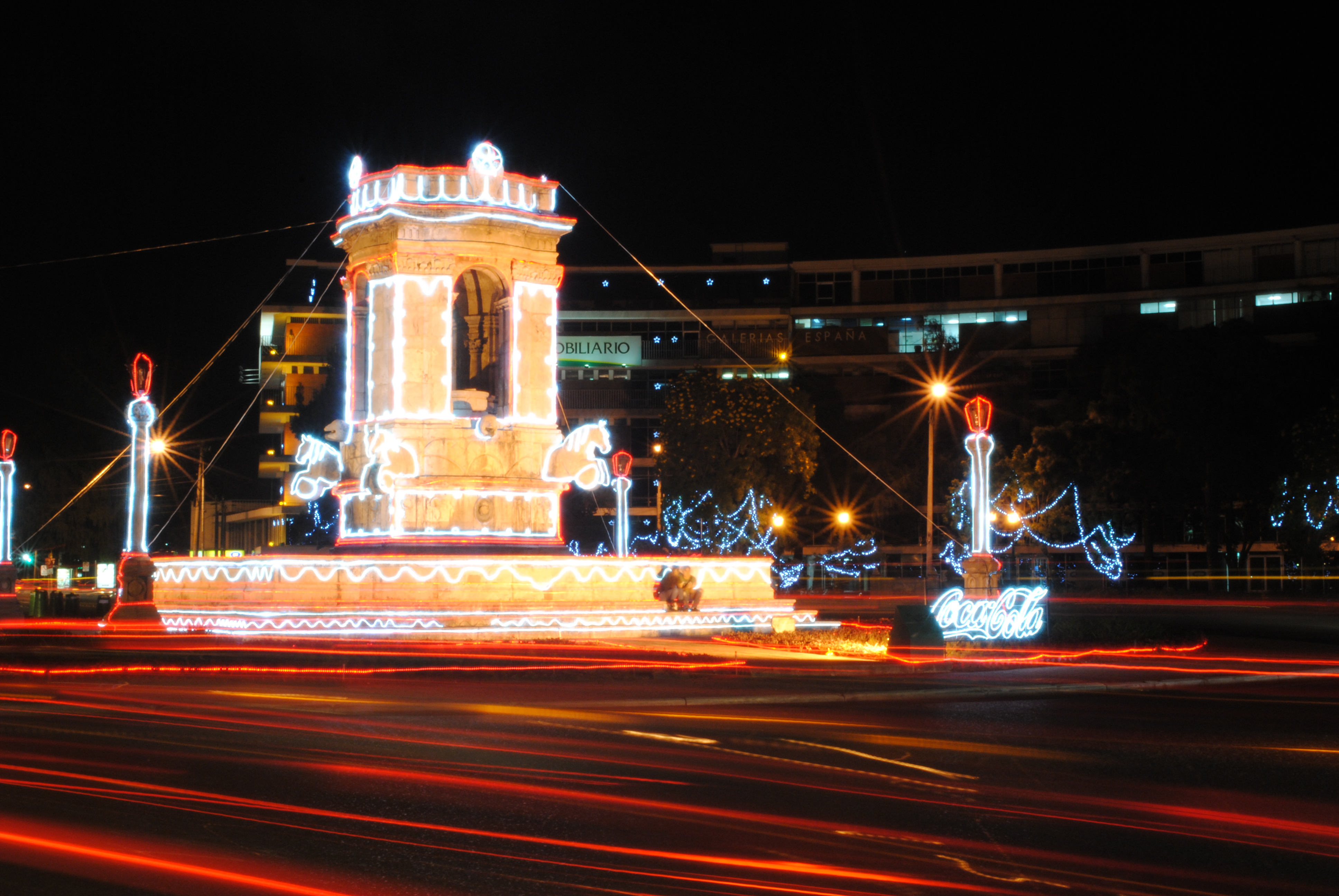 La Plaza España este año ahora está iluminada por el patrocinio de Coca-Cola. Zona 9, ciudad de Guatemala. Fotografía por Josué Goge